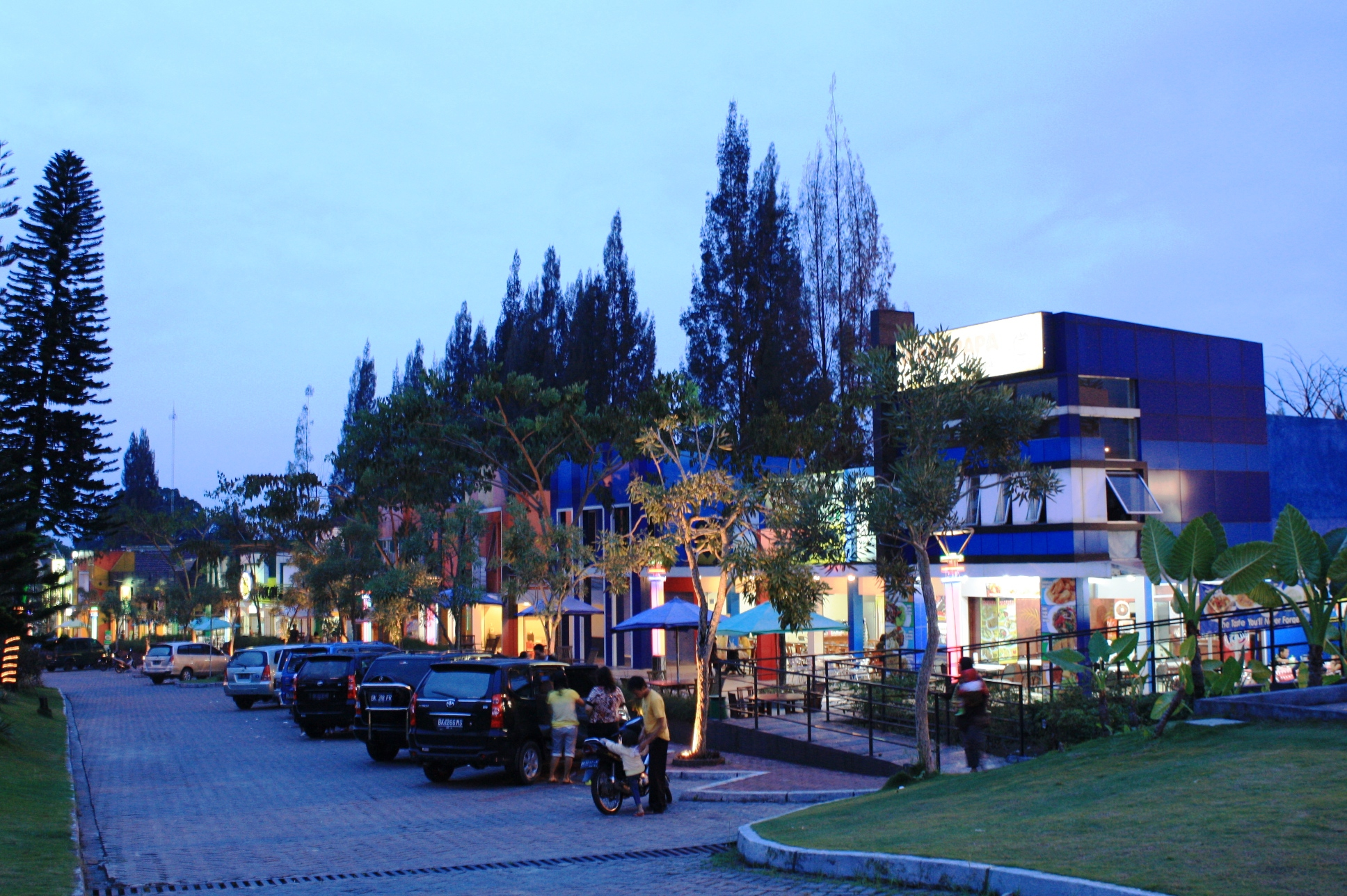 Green Hill